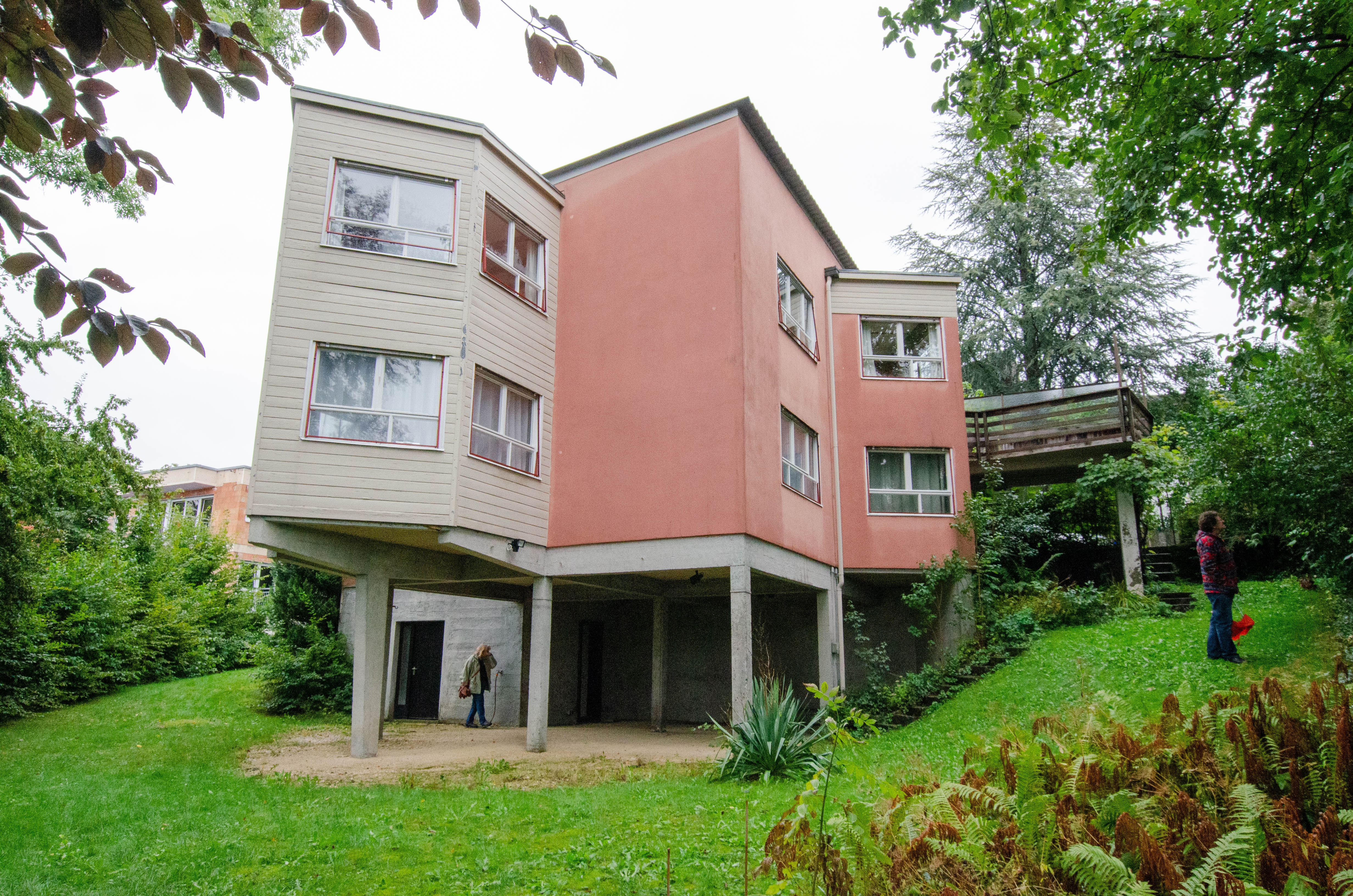 Hugo-Häring-Haus am Tag des offenen Denkmals; 2019